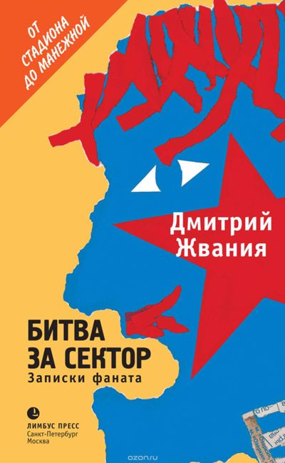 Обложка книги "Битва за сектор", автор Дмитрий Жвания